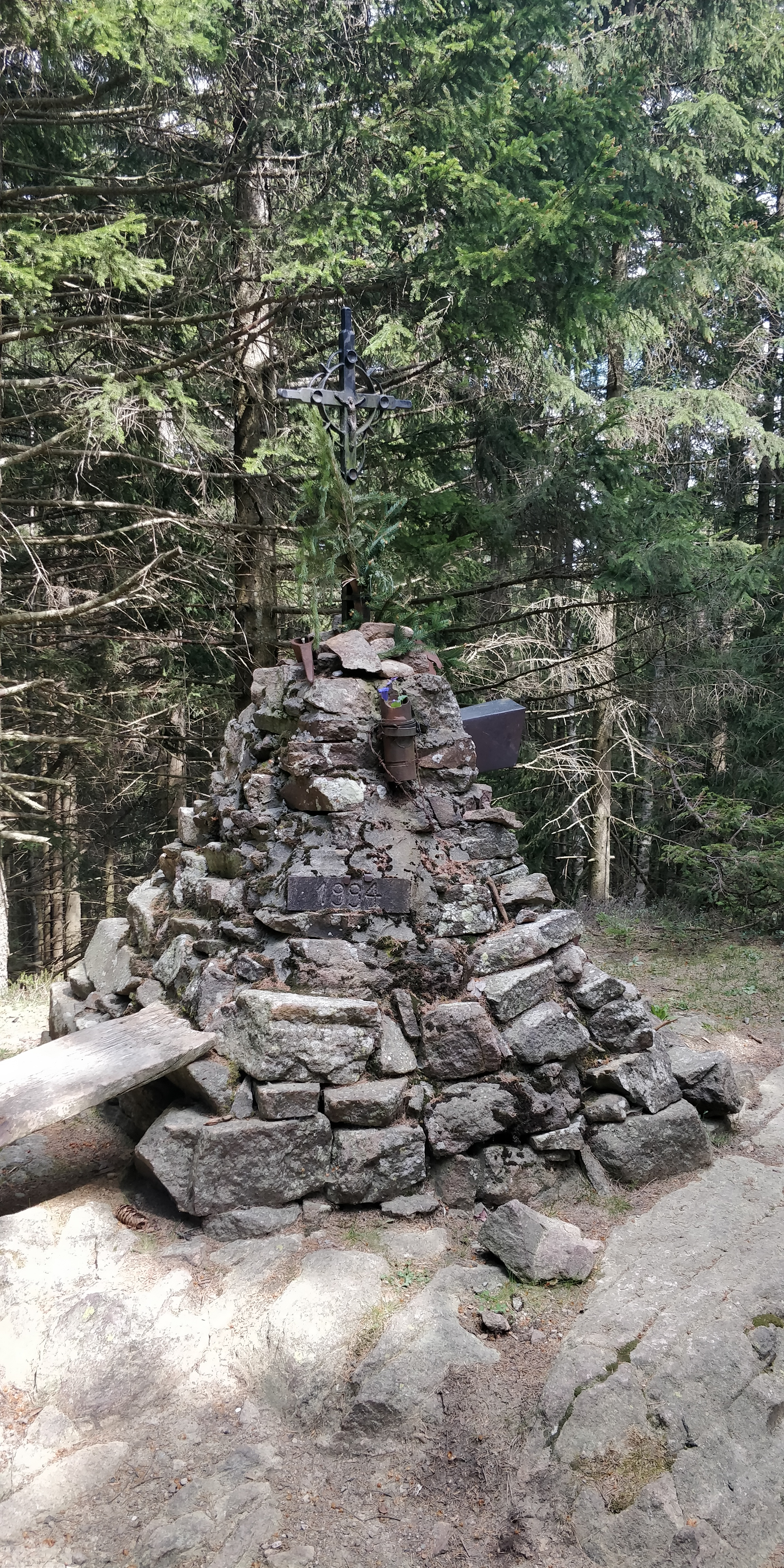 Il piccolo monumento sulla cima di Monte Pozza, composto da una piramide di pietre e un piccolo crocifisso, in provincia di Bolzano